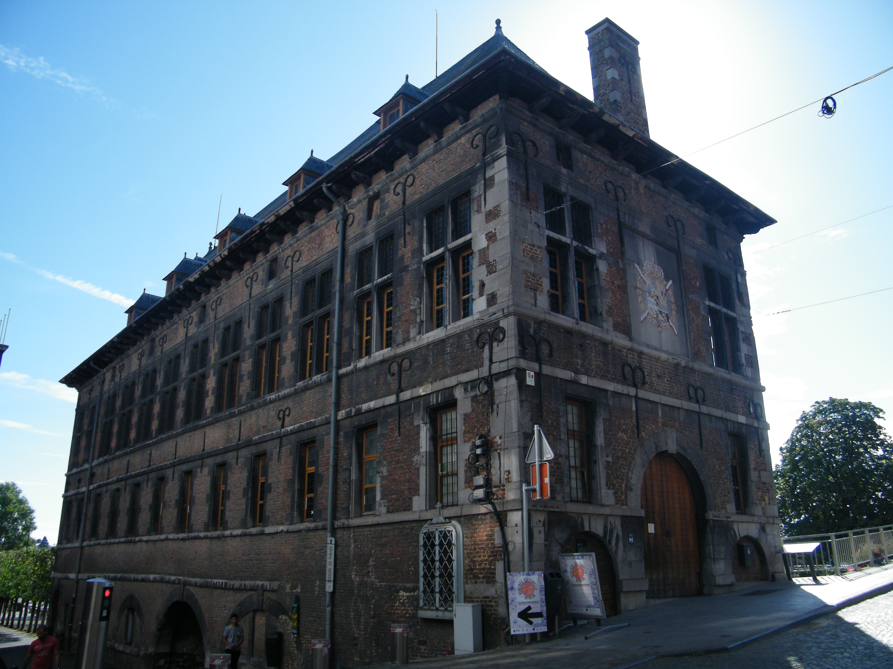 Musée Archéologique, ancienne boucherie et Halle al'Chair